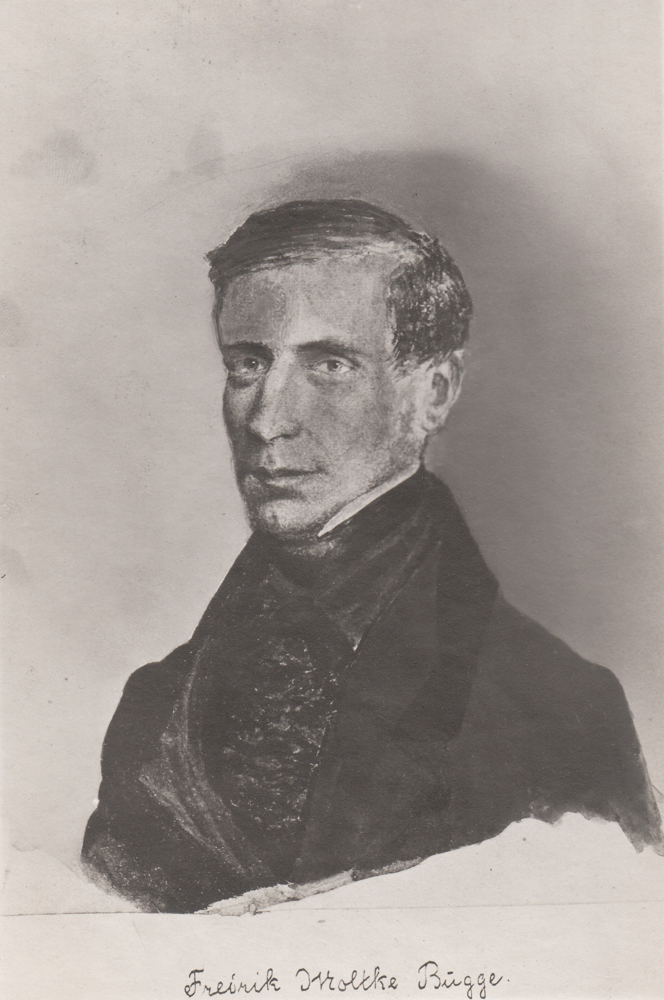 Format: Fotopositiv Dato / Date: Ukjent Fotograf / Photographer: Ukjent Sted / Place: Trondheim Lenke / Link: Frederik Moltke Bugge (Wikipedia) Lenke / Link: Frederik Moltke Bugge (Store Norske Leksikon) Eier / Owner Institution: Trondheim byarkiv, The Municipal Archives of Trondheim Arkivreferanse / Archive reference: Tor.H41.B37.F2765 Merknad: Baksiden av bildet har påskrevet henvisning til boken Trondheim Bys Historie, bind 3, side 268. Frederik Moltke Bugge, født 1806, død 1853, født i Trondheim, norsk skolemann, sønn av P. O. Bugge. Rektor ved katedralskolen i Trondheim 1833–51. Kjent som en ivrig forkjemper for den klassiske dannelse. En studiereise i Europa resulterte i et trebinds verk som også inneholder Bugges tanker om en reform av det norske skolevesen. Hovedtanken er at hele landets skolevesen må behandles som en enhet og de enkelte skoletyper samordnes bedre og tilpasses hverandre. Bugge ble en av foregangsmennene for enhetsskolen i Norge. Medlem av den store skolekommisjonen av 1839. Kilde: Store Norske Leksikon